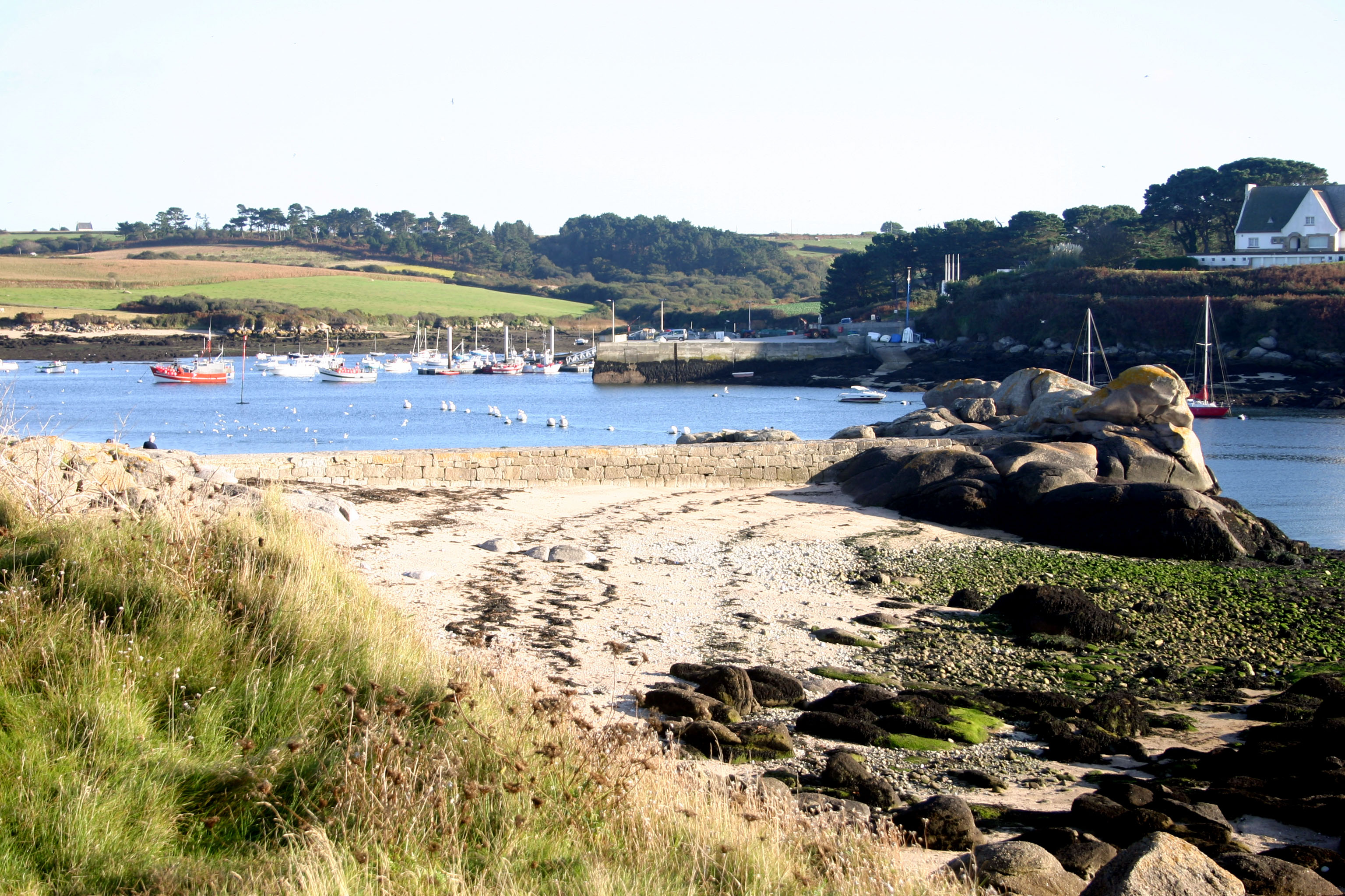 Entrée de l'Aber-Ildut-En face le quai de Lampaul-Plouarzel-Lanildut-Finistère-Bretagne-France